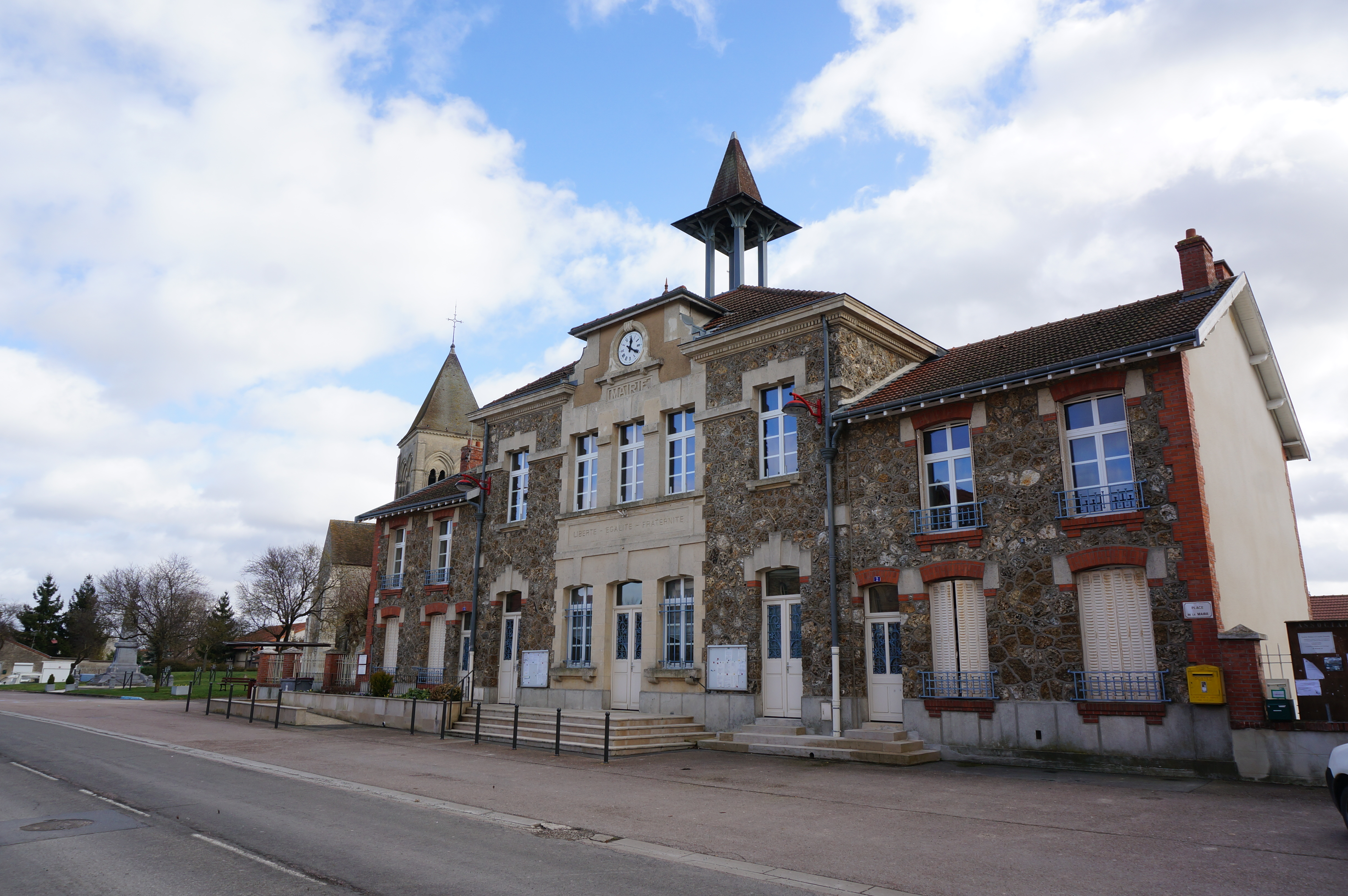 Vues de Beine-Nauroy.